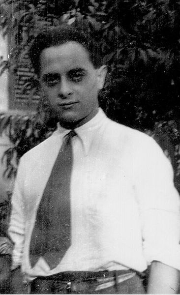 Immagine ripresa con lo scanner da una fotografia originale conservata nell'Archivio Lapadula del quale Bruno Filippo Lapadula è l'erede e il responsabile.